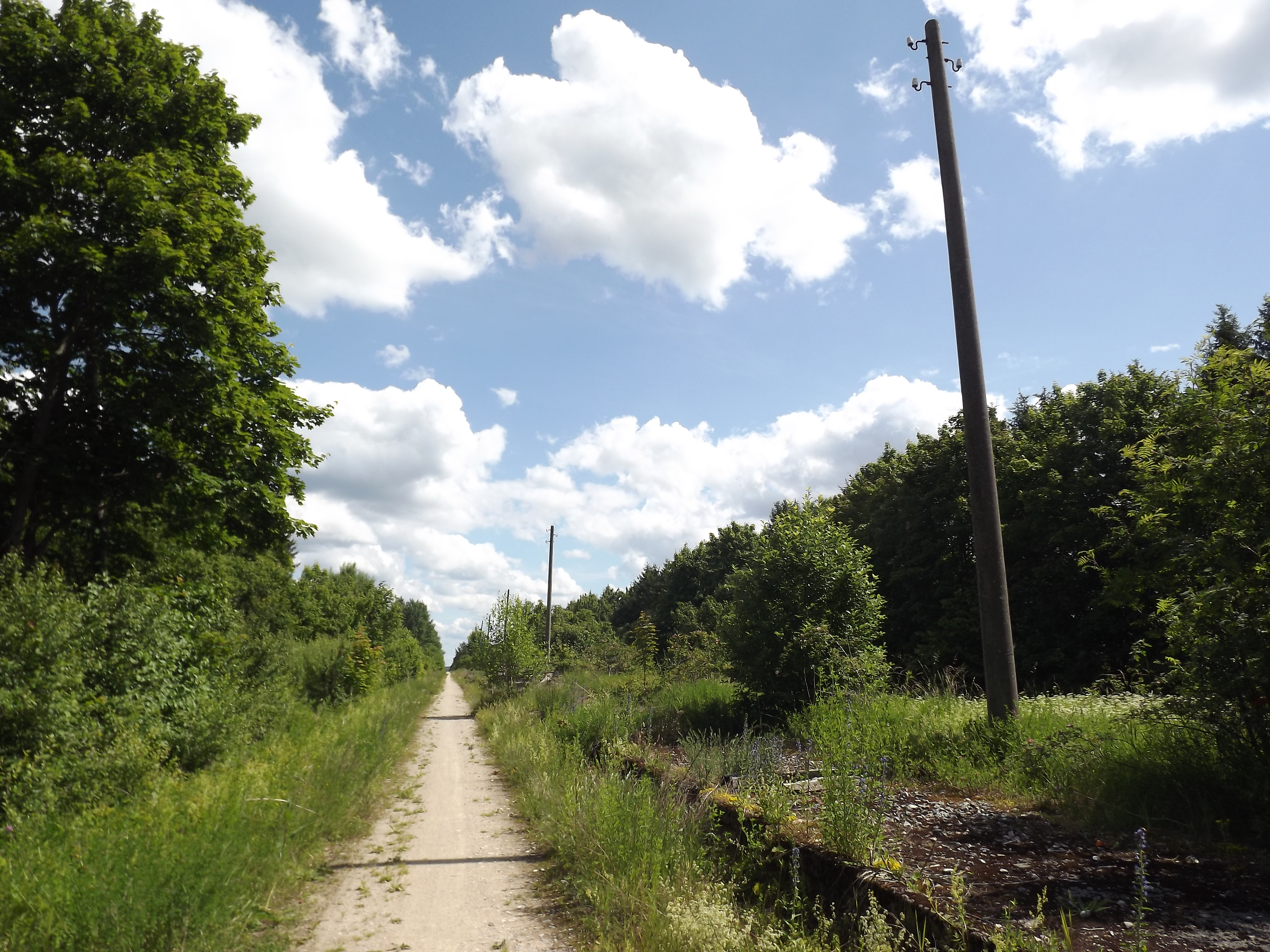 Endine Nigula raudteepeatus.